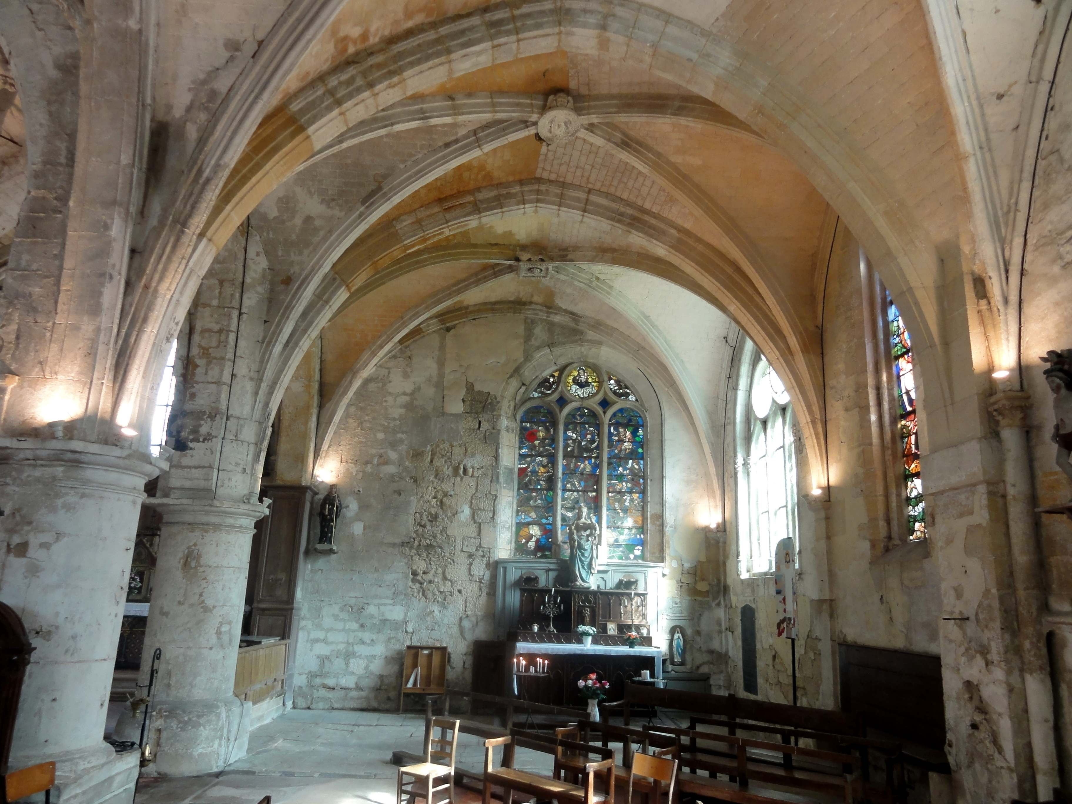 Chapelles sud, vue vers l'est (la seconde travée est le croisillon sud).